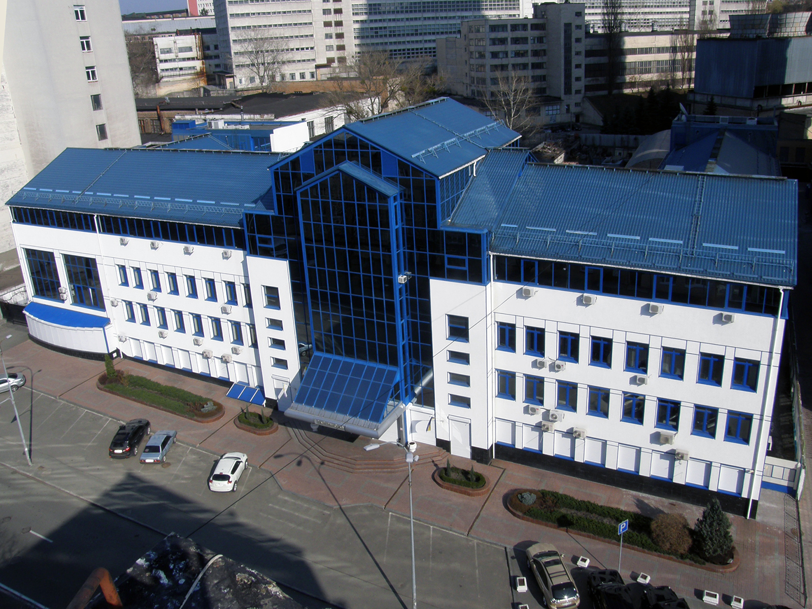 главный офис Укртрансгаза